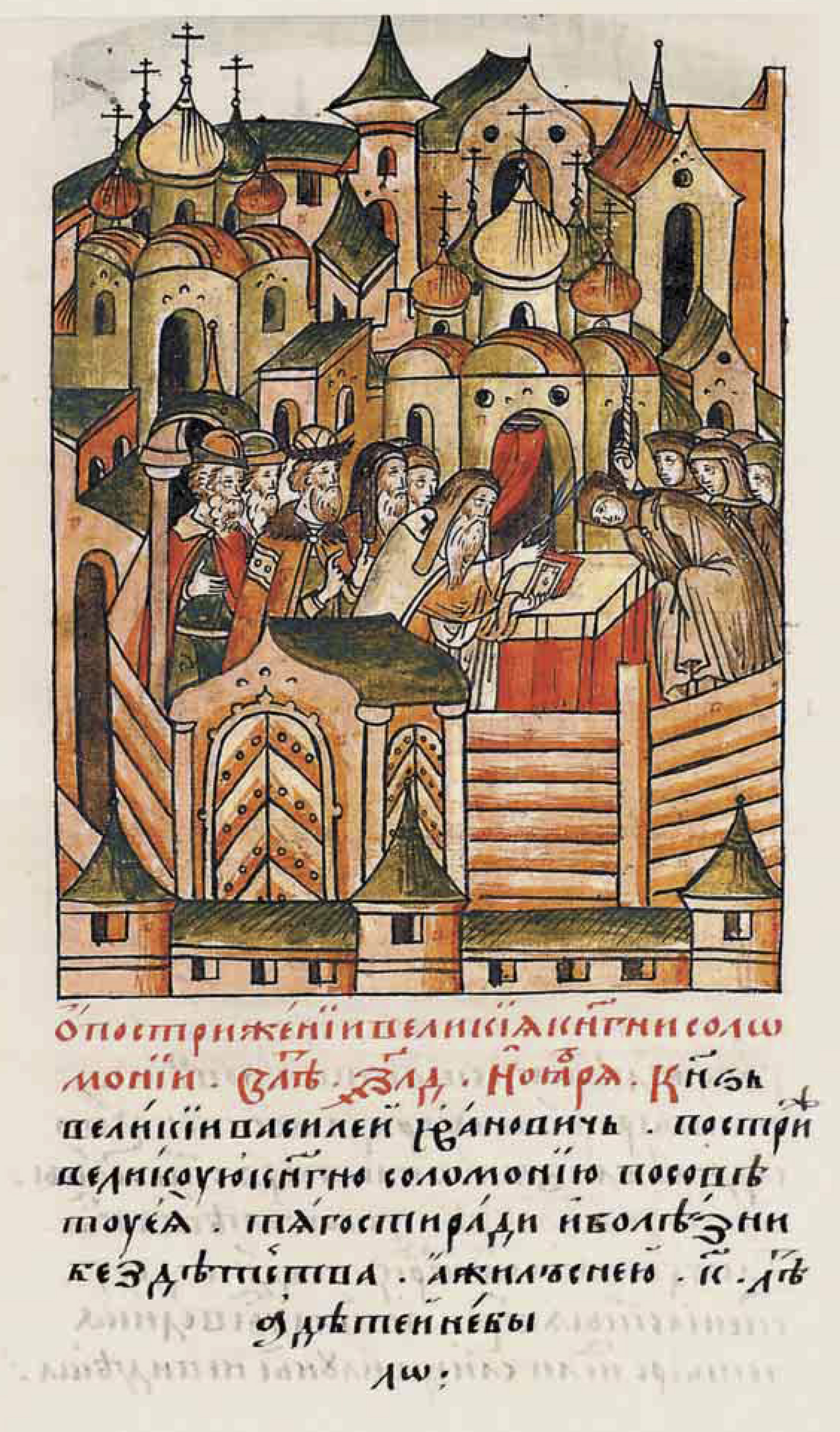 О пострижении ве- ликой княгини Со- ломонии. В 7034 году в ноябре великий князь Василий Ивано- вич постриг великую, княгиню Соломонию по желанию ее из- за тяжести болезни и бездетства. А жил с нею 20 лет, и детей не было